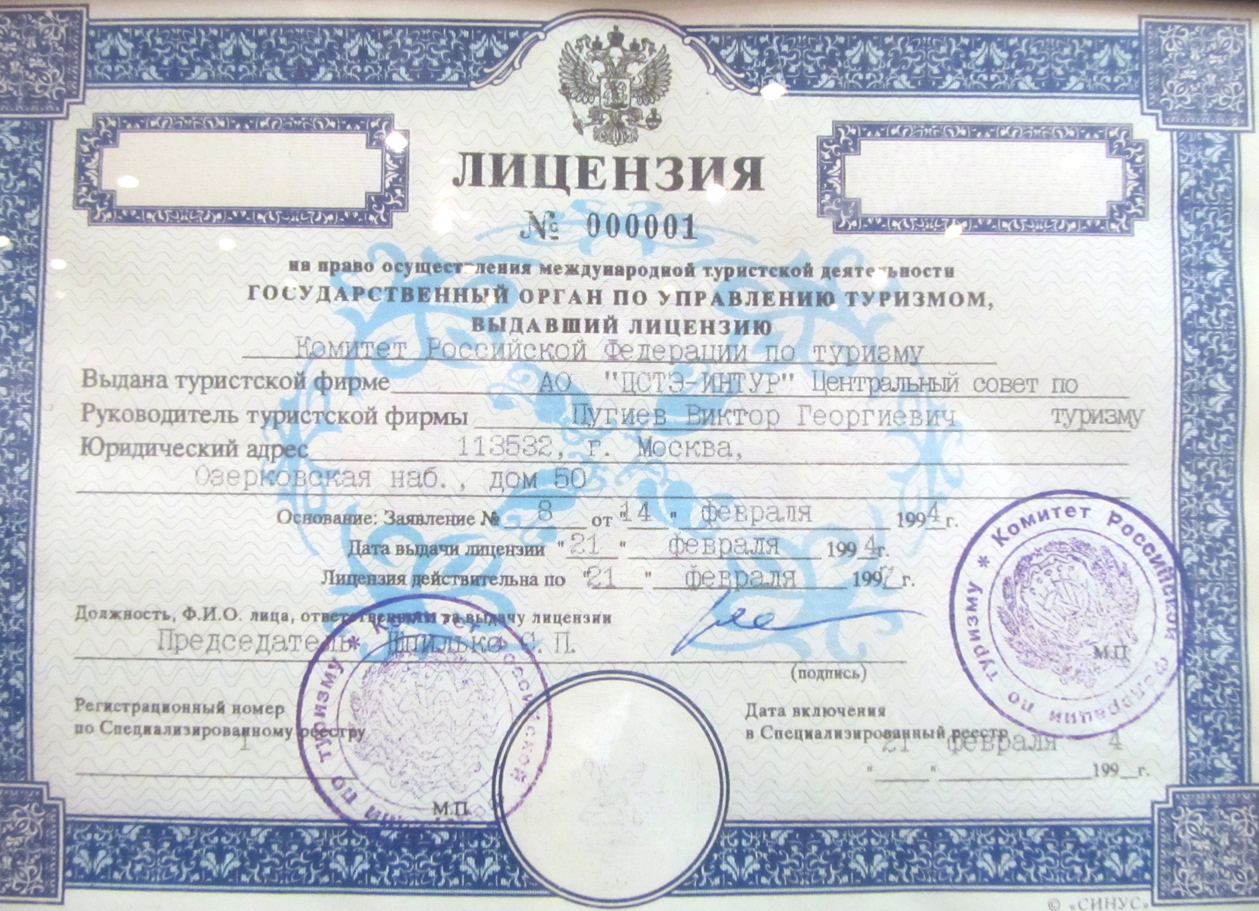 Лицензия № 000001, выданная ОАО «ЦСТЭ-ИНТУР» Центральный совет по туризму Комитетом Российской Федерации по туризму (Роскомтуризм) для осуществления права международной туристической деятельности